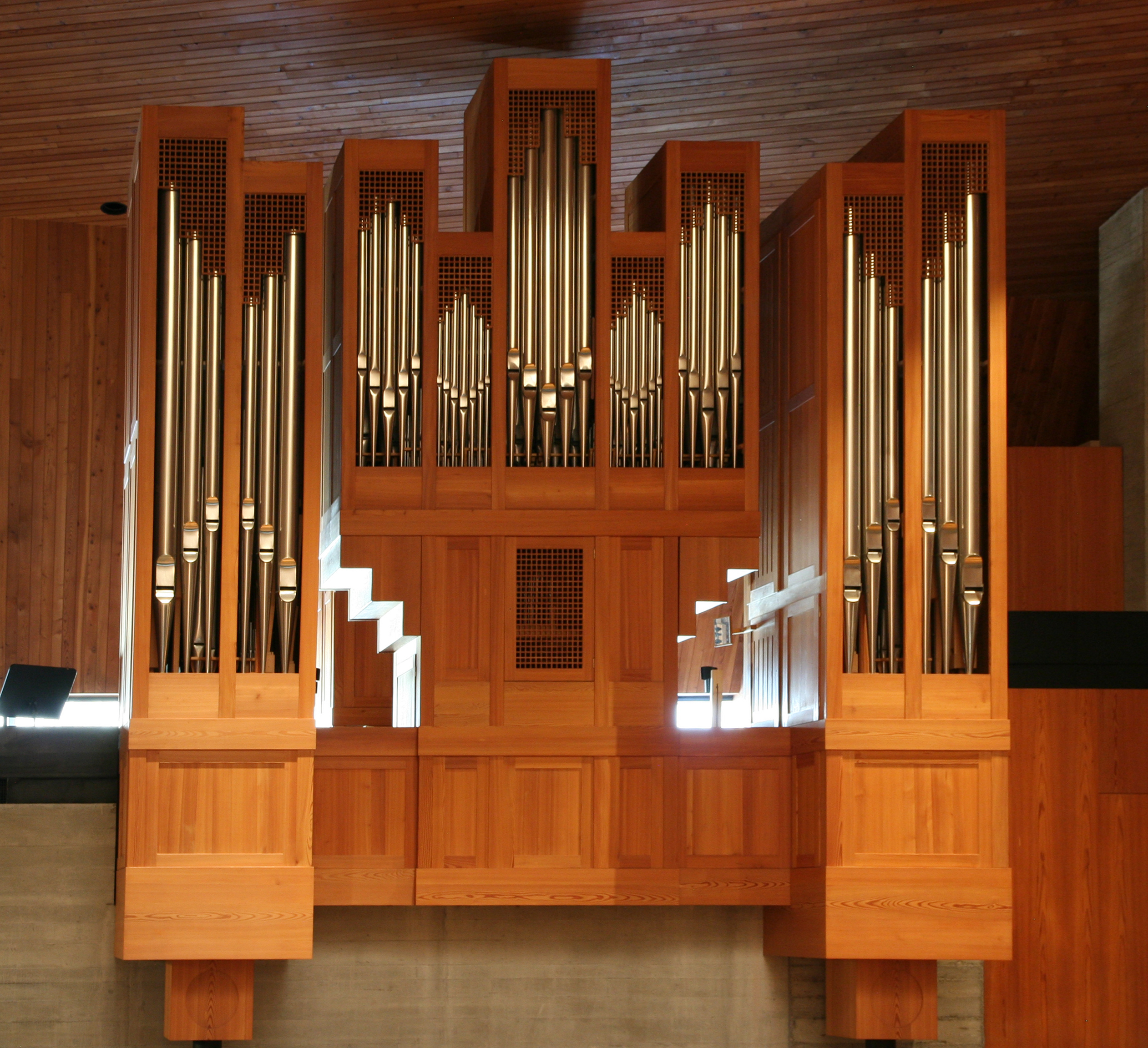 Römisch-katholische Pfarrkirche Maria Krönung Zürich, Orgel